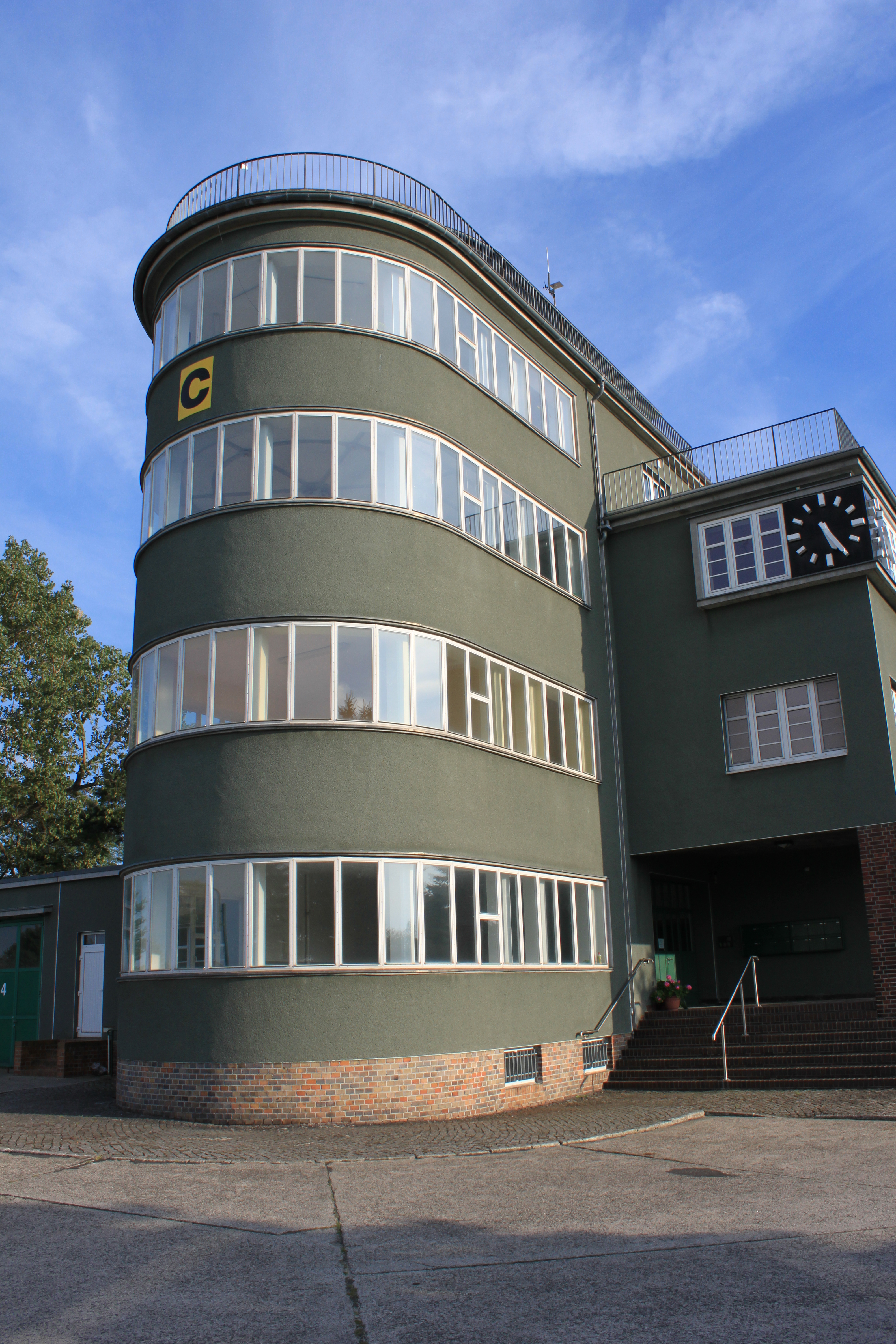 Tower Lausitzflugplatz Finsterwalde/Schacksdorf